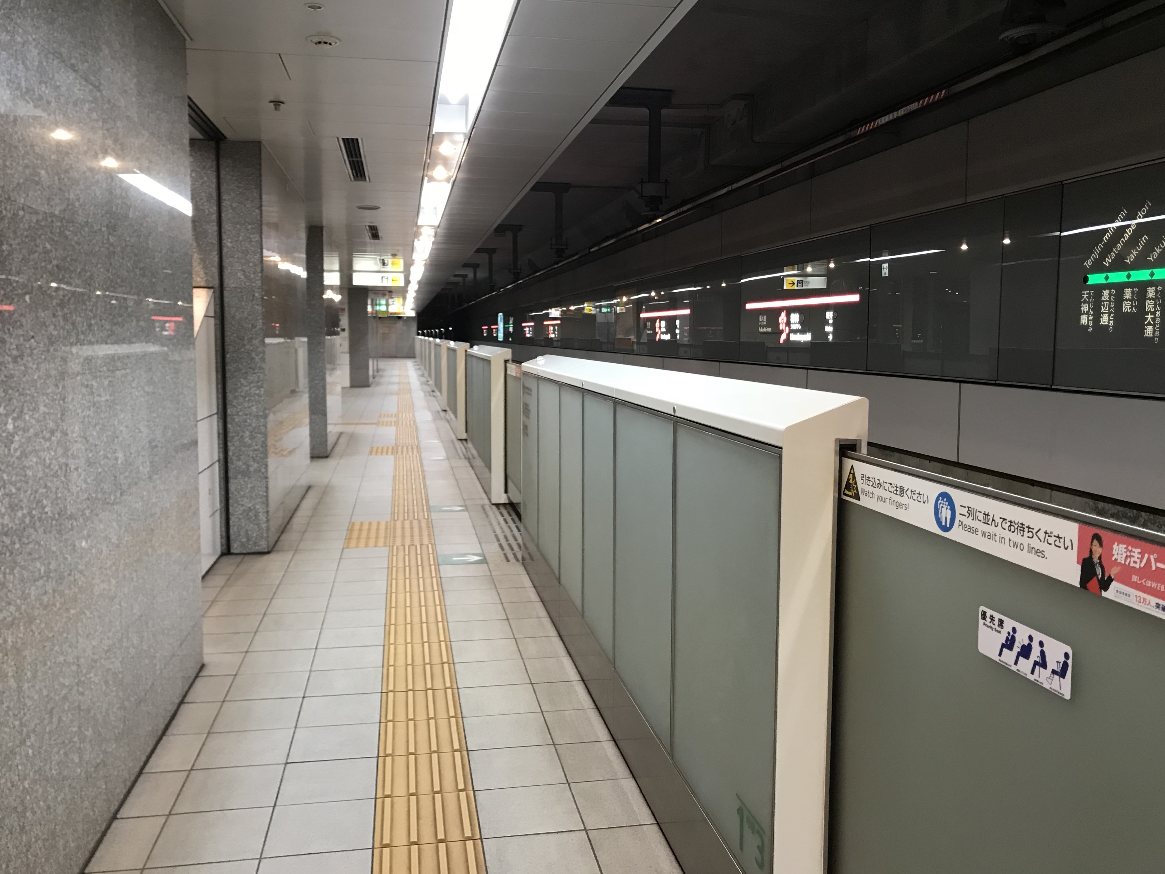 梅林駅のホーム(奥は福大前方面)